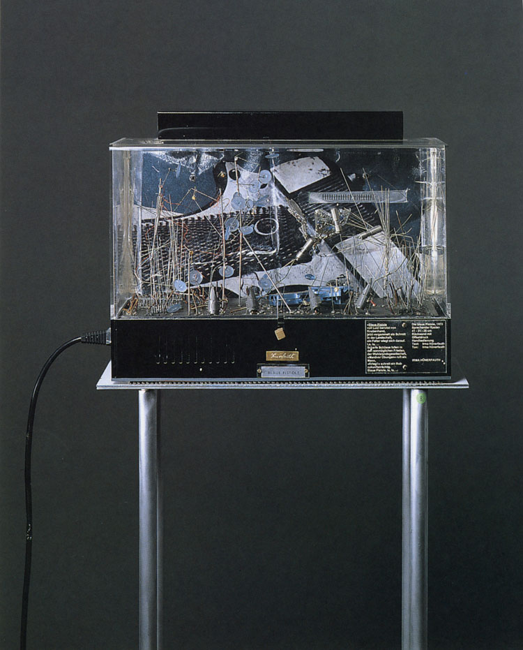 „Blaue Pistole“ (Foto des sprechenden Kastens von Irma Hünerfauth (1973)